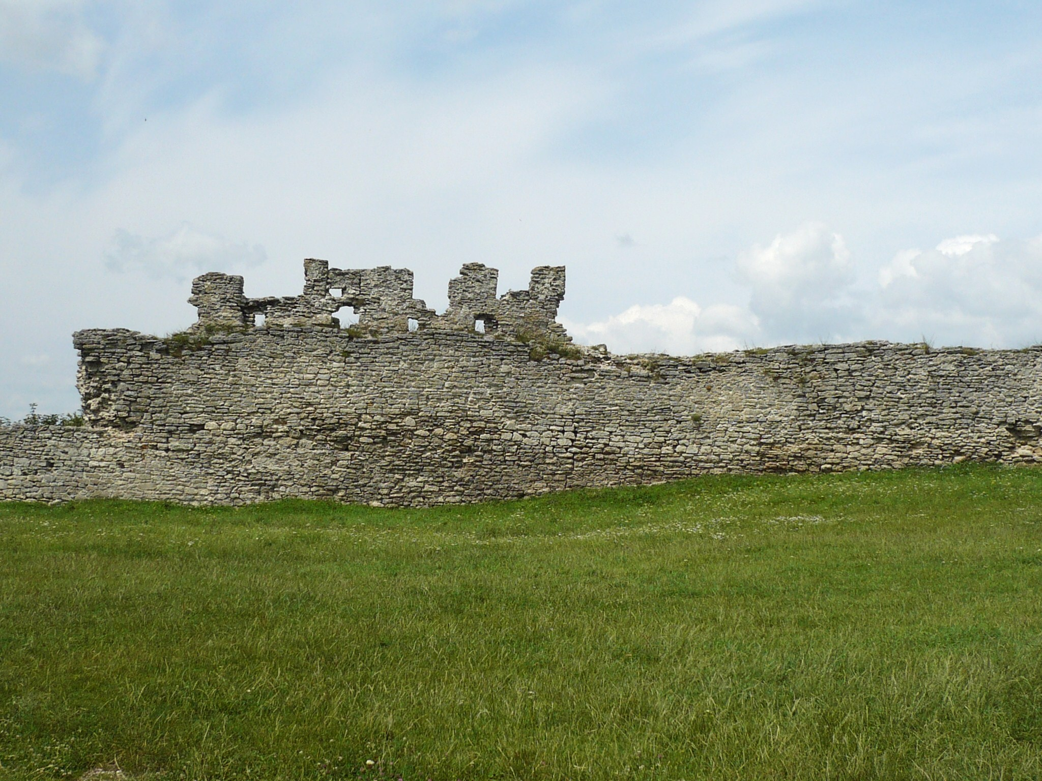 Zamek w Krzemieńcu